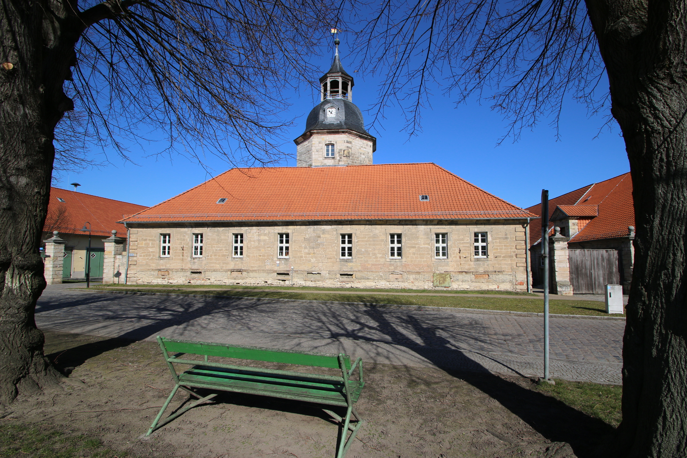 Gut Aderstedt/Huy